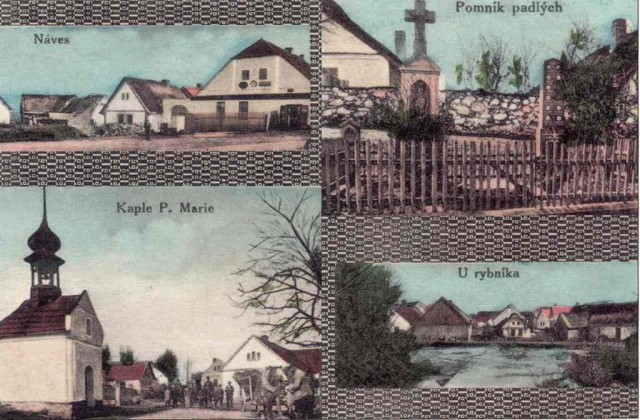 Historická fotografie obce Březí